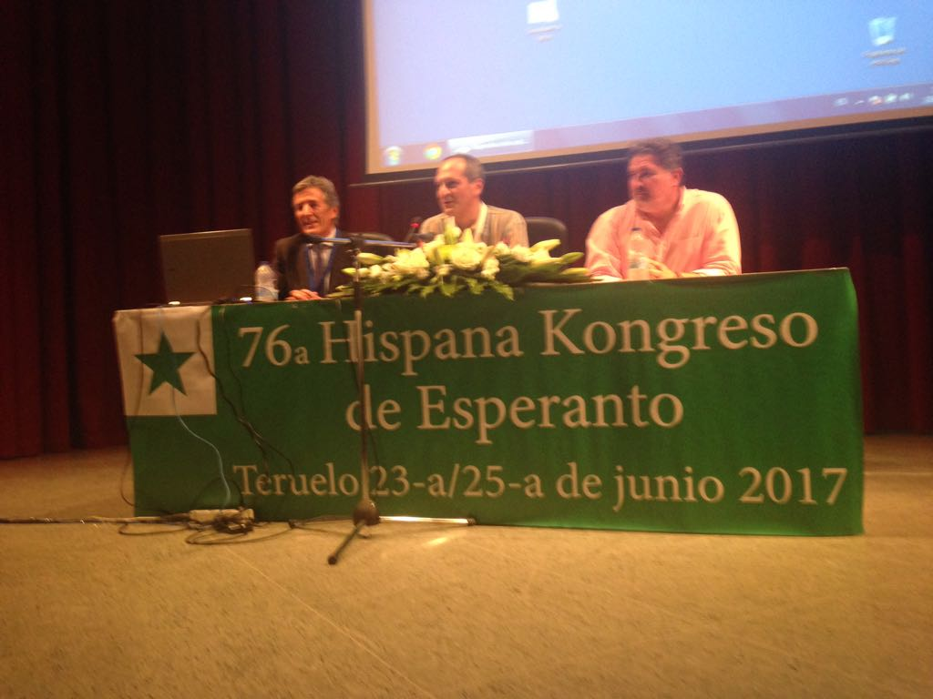 Podio dum la kongreso.